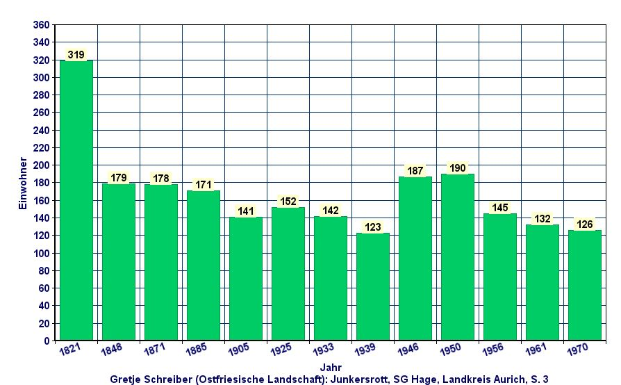 Diagramm der Einwohnerentwicklung Junkersrotts 1821 bis 1970 - Junkersrott ist seit 1972 Ortsteil der Gemeinde Hagermarsch, Samtgemeinde Hage, Landkreis Aurich, Niedersachsen, Deutschland